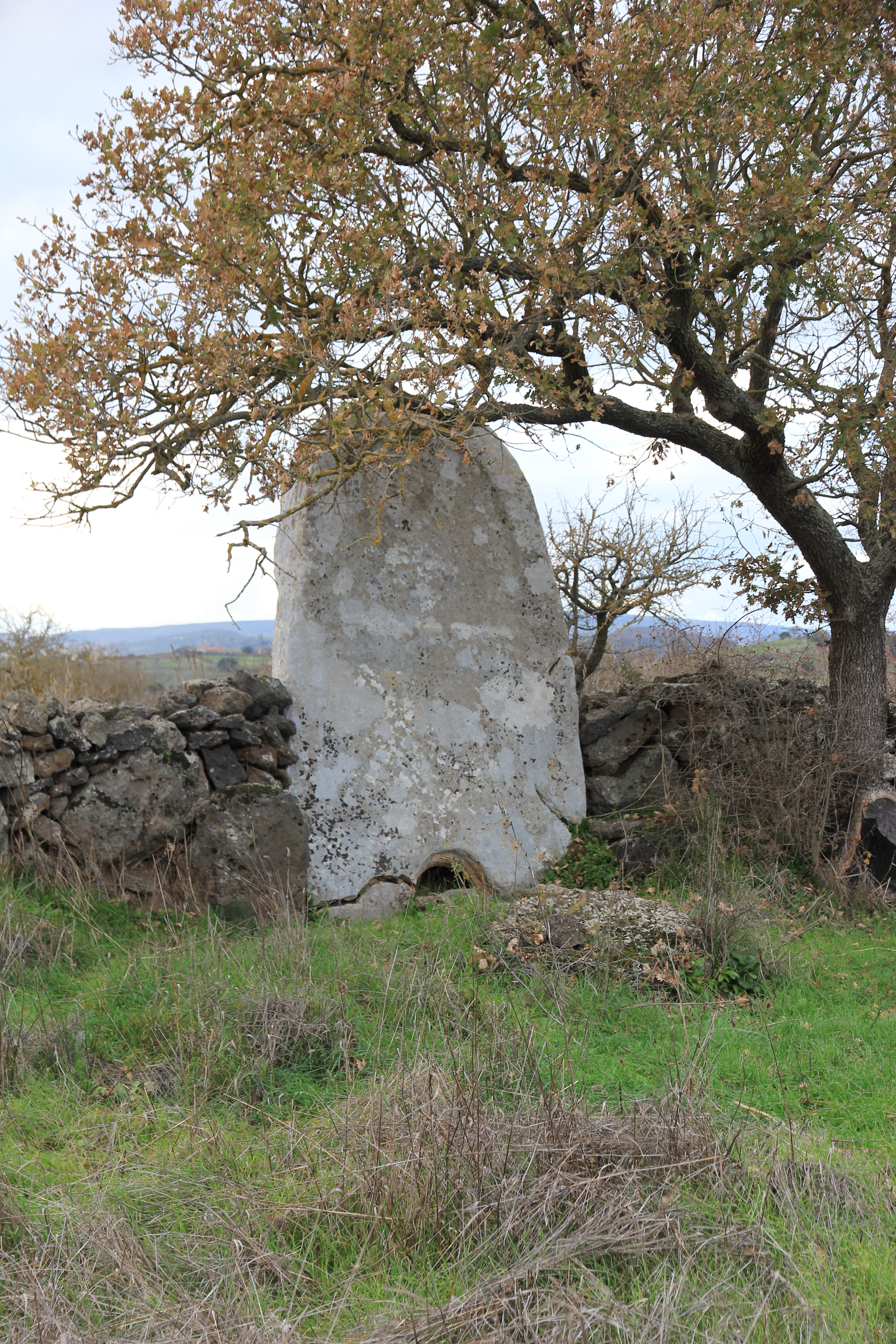 Torralba - Tomba dei giganti di Sa Pedra Covaccada